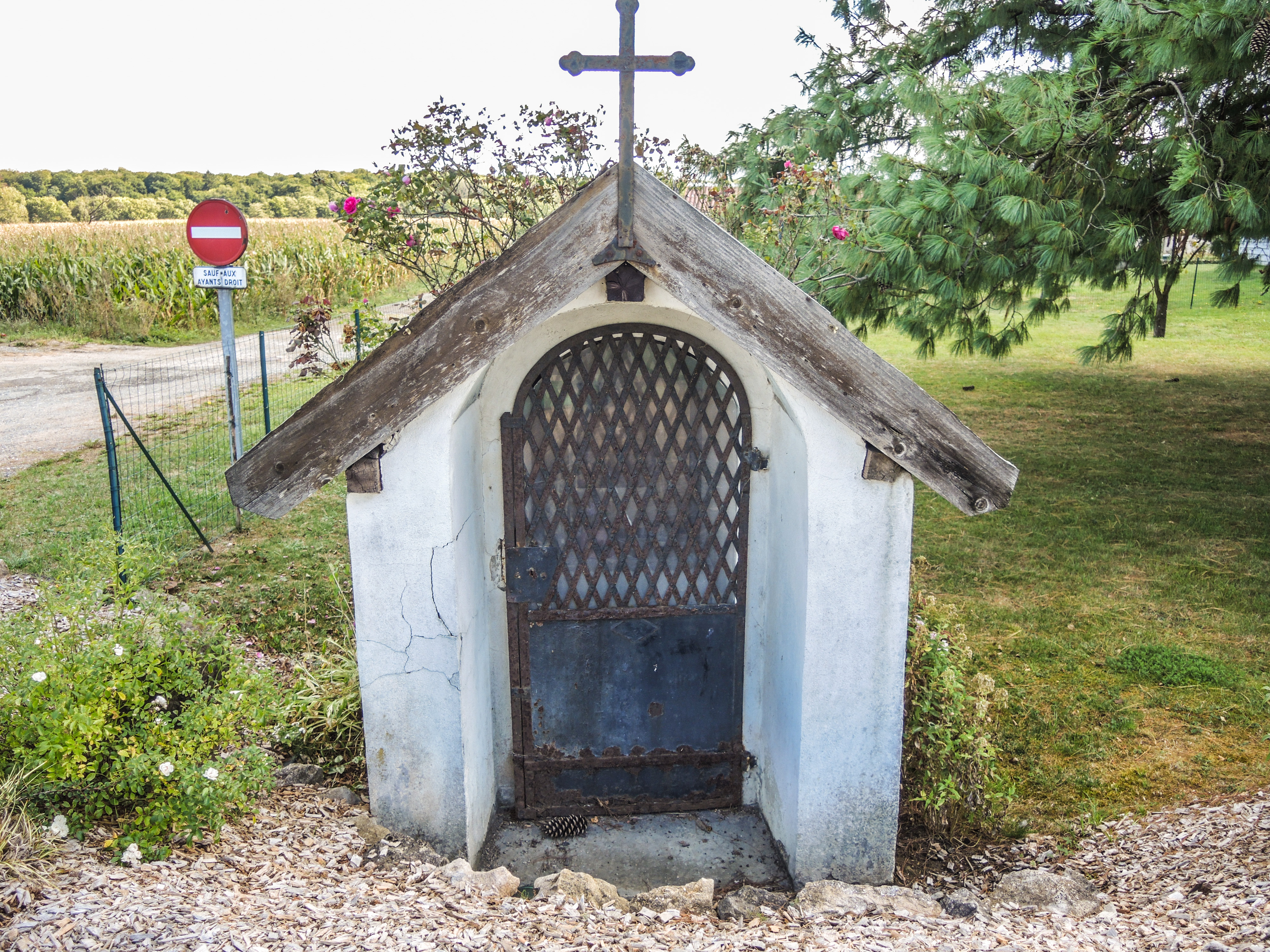 Chapelle, à la sortie est de Lachapelle-sous-Rougemont. Territoire de Belfort.